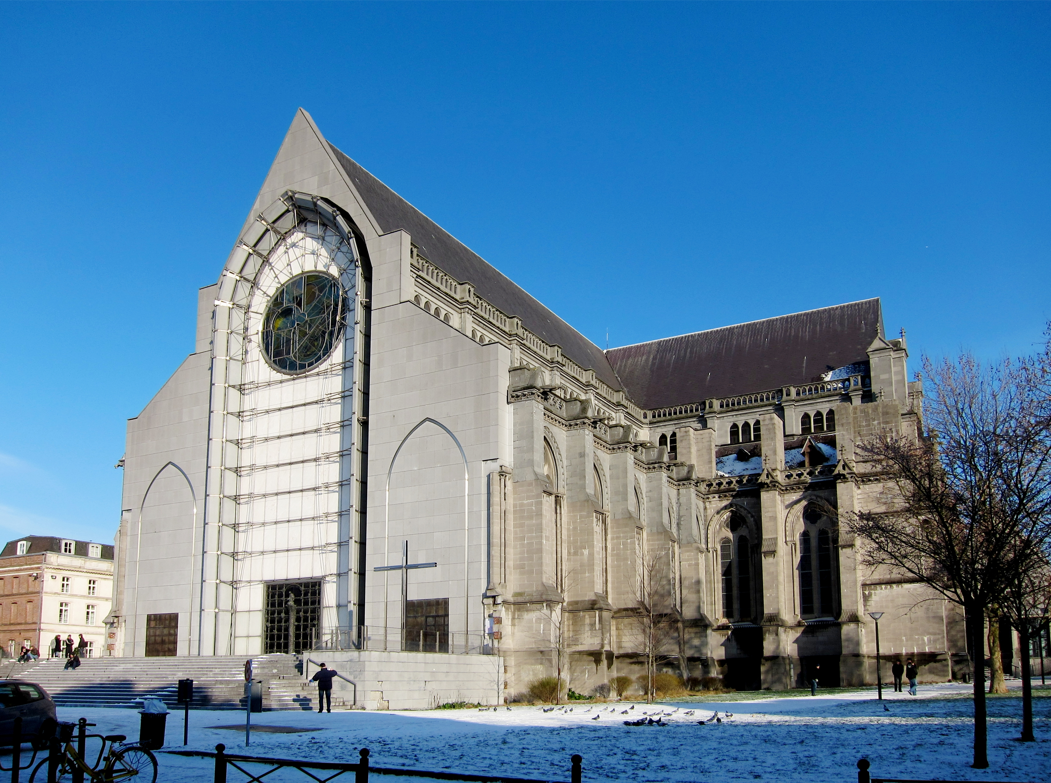 La cathédrale Notre-Dame-de-la Treille à Lille (Nord).